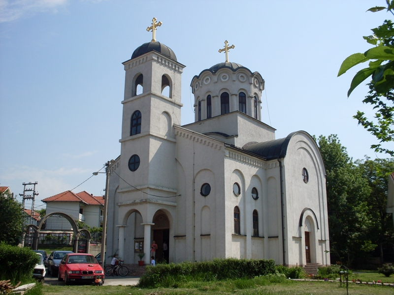 Храм Српске православне цркве у Малом Мокром Лугу посвећен Светом мученику Трифуну.